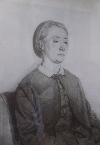 Гелена Скірмунт. Аўтапартрэт